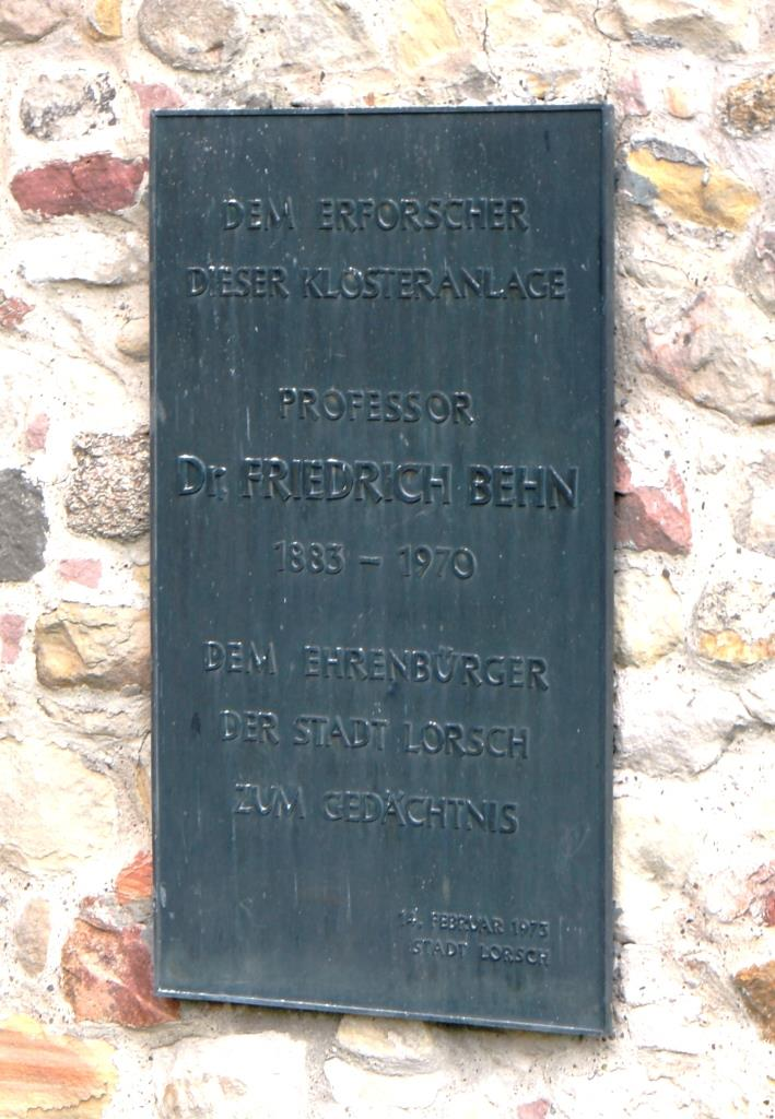 Gedenktafel für den Prähistoriker Friedrich Behn (1883-1970) am Kloster Lorsch